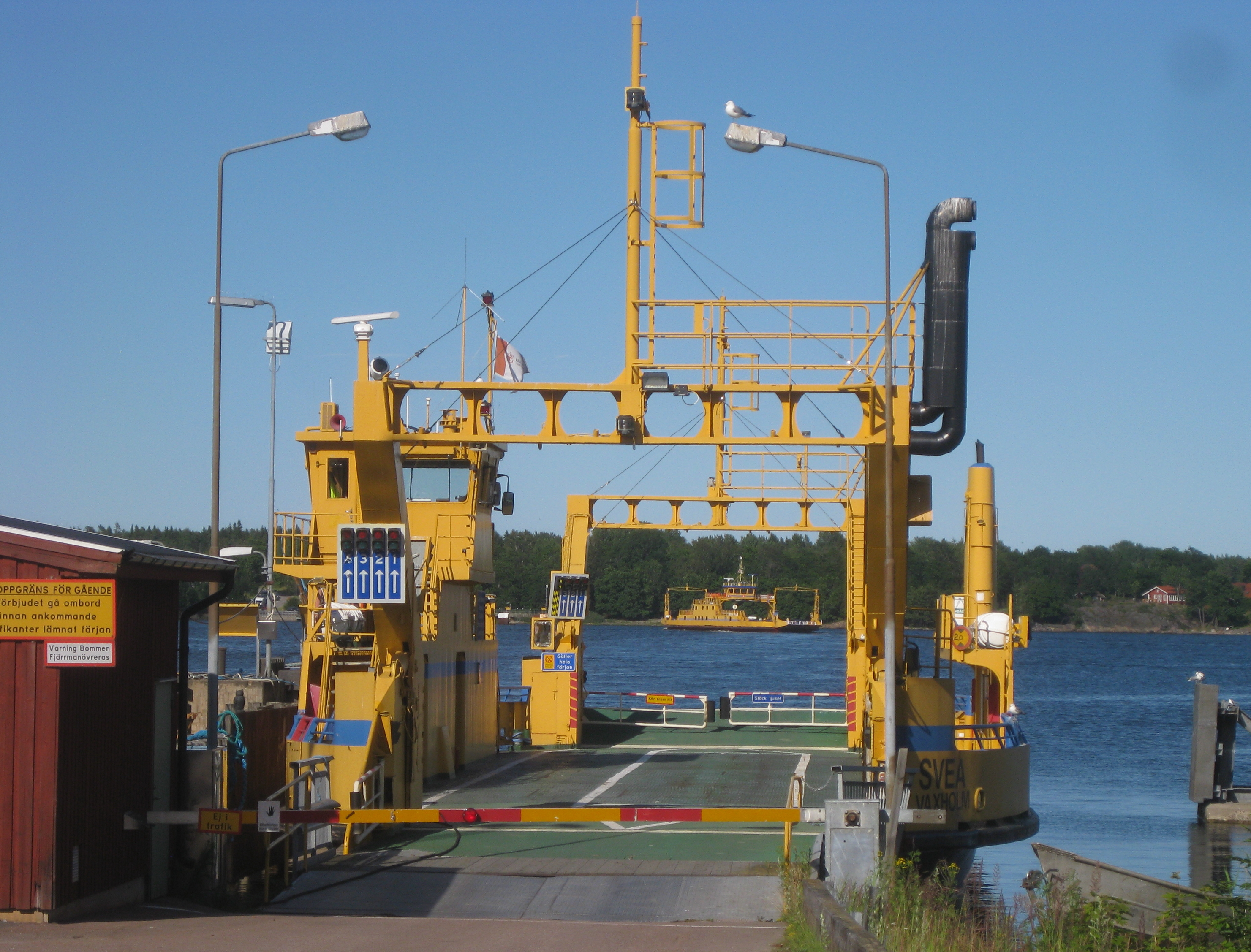 Färjorna mellan Gräsö och Öregrund